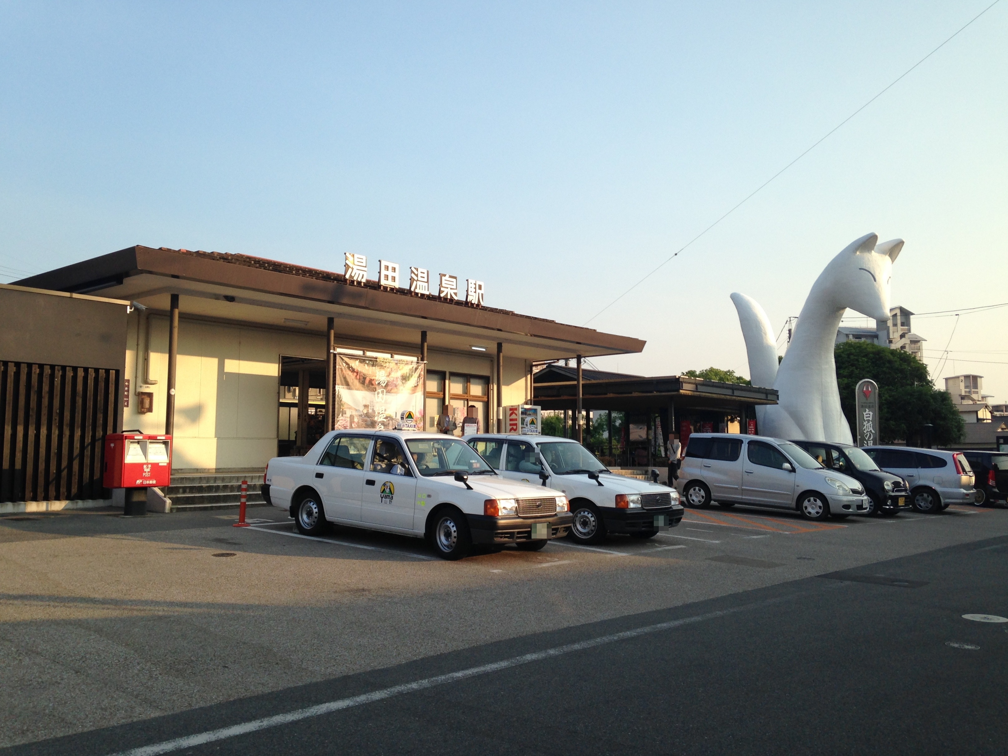 湯田温泉駅と白狐の湯